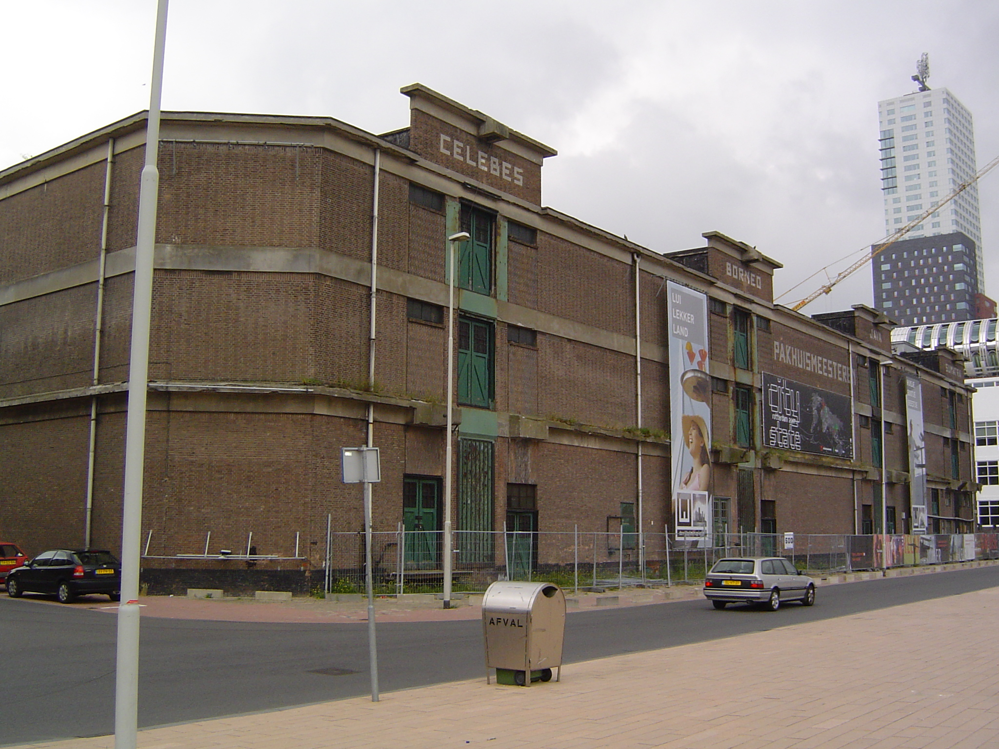 Pakhuismeesteren, Rotterdam, The Netherlands